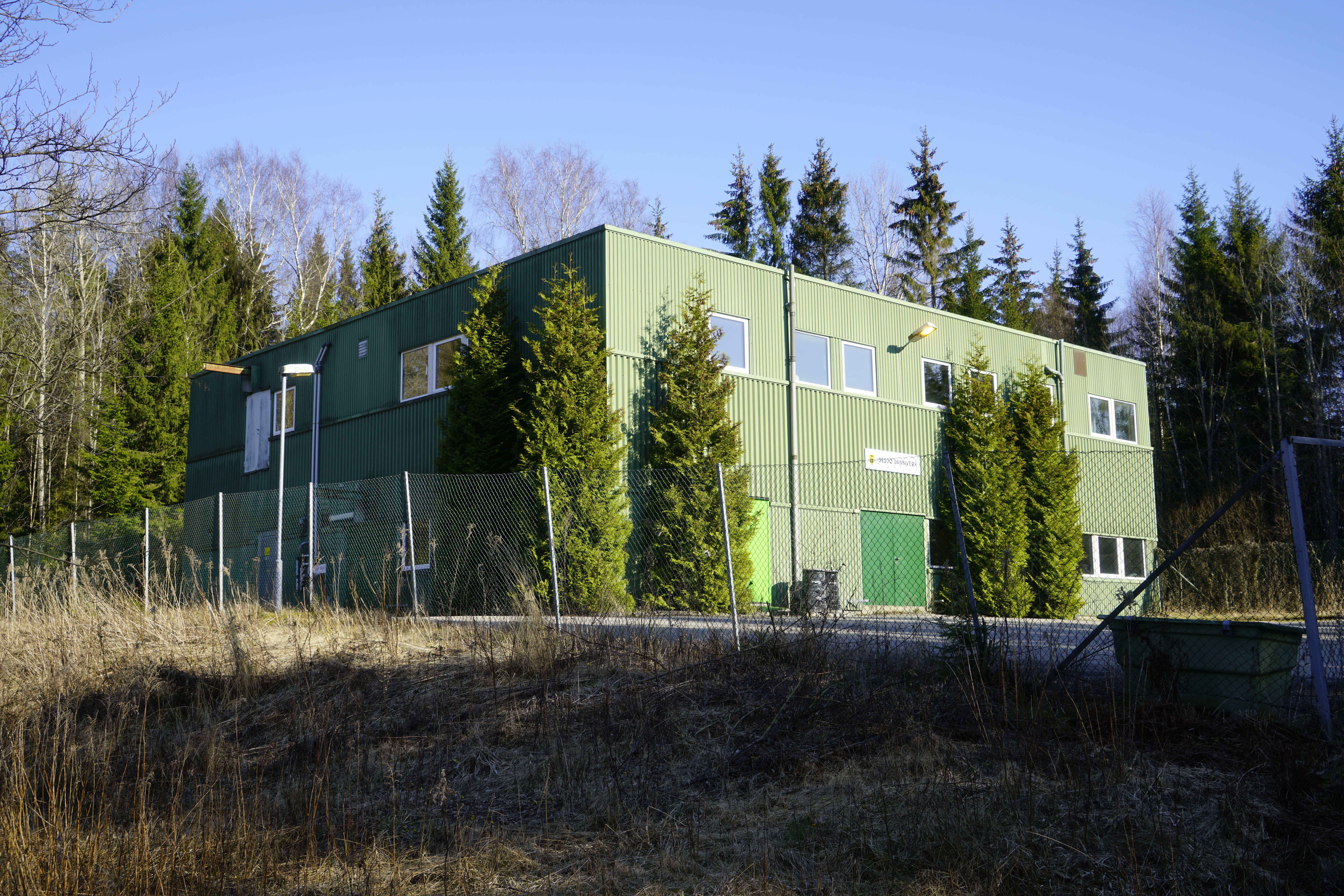 Isesjø vannverk